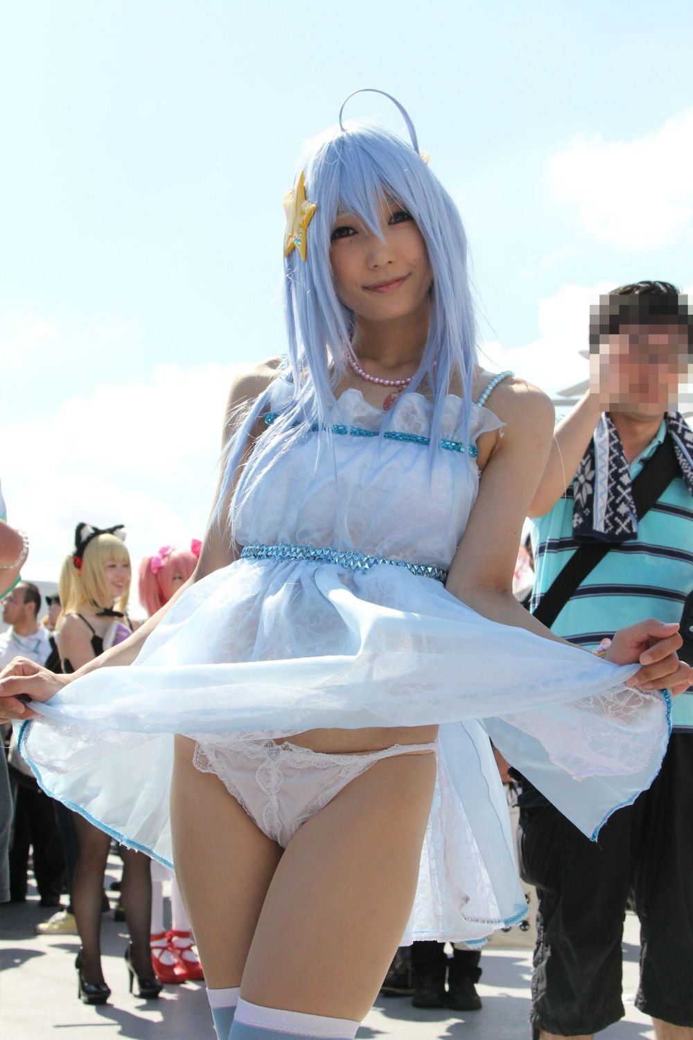 2012年8月12日に東京で行われたコミックマーケット82 3日目のコスプレイヤーlenfriedです。 衣装はトップアイドル アクア（カードファイト!! ヴァンガード）